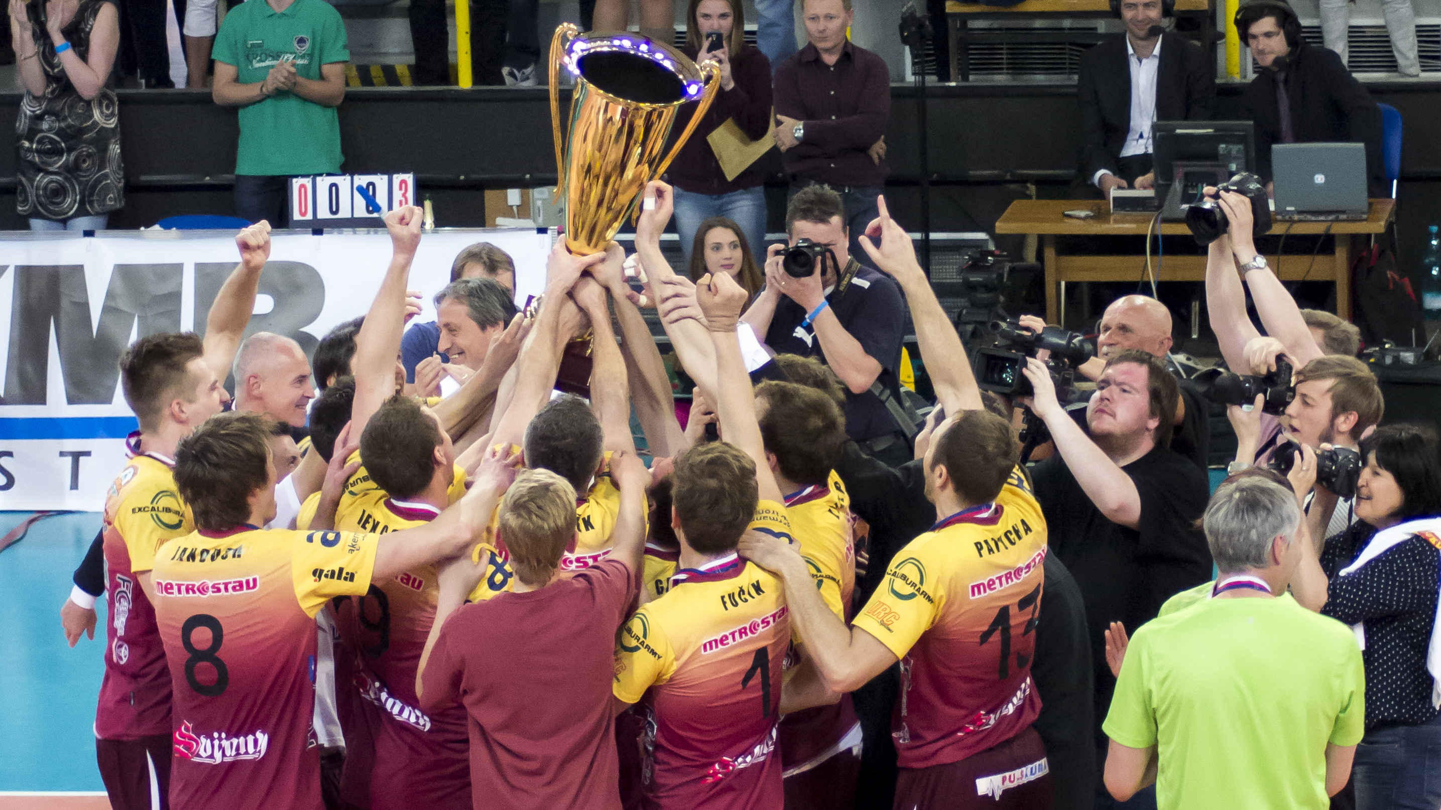 Mistr extraligy pro rok 2014/2015